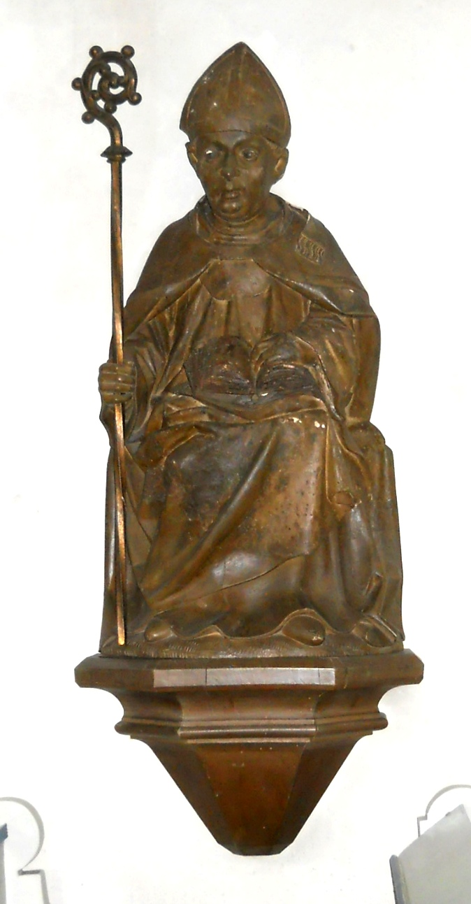 Mittelalterliche Bischofsfigur (hl. Willibald?) in der Kirche St. Martin und Ägidius in Wald im Landkreis Weißenburg-Gunzenhausen, Bayern